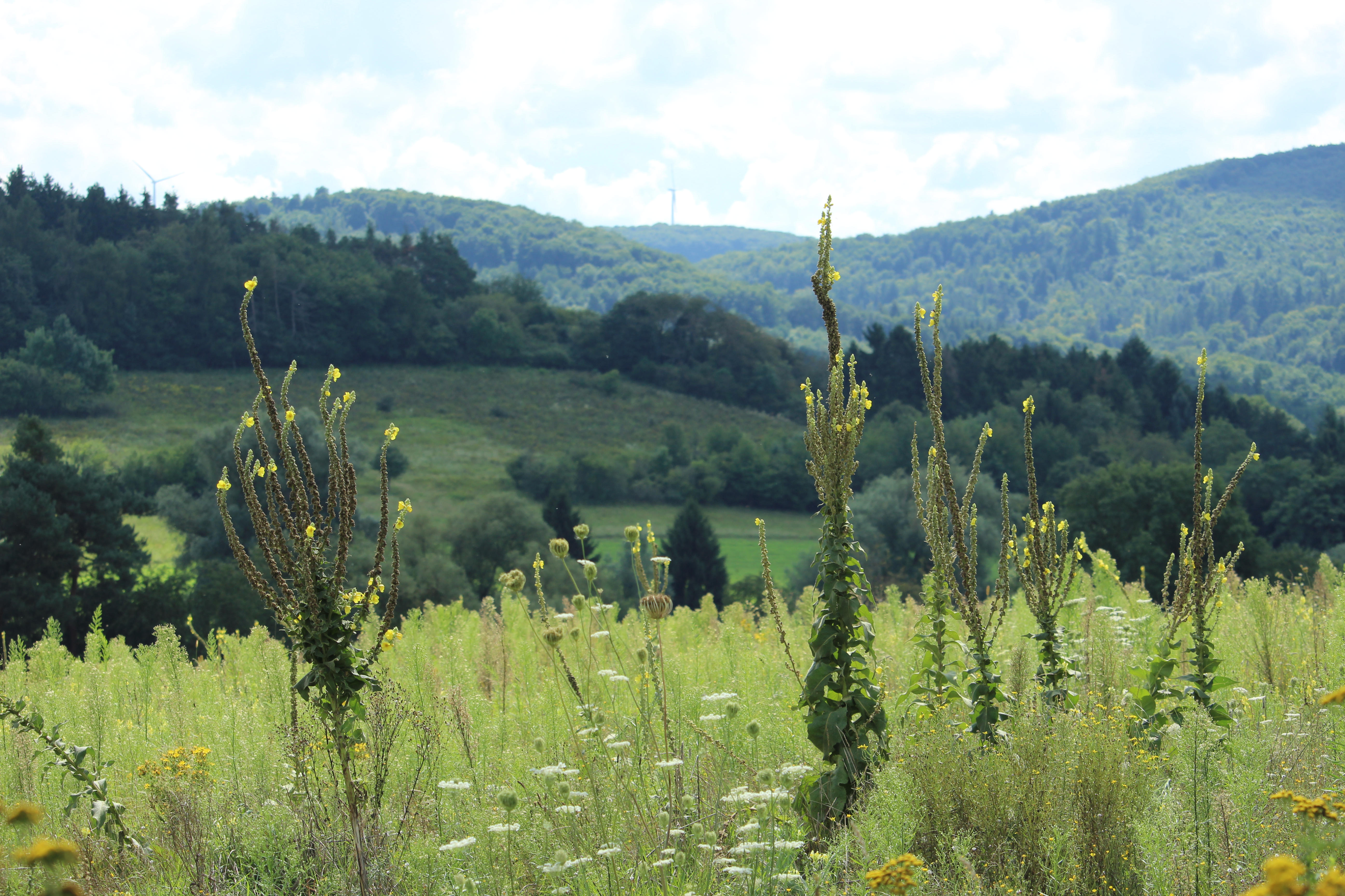 Matthias Lothhammer Spätsommerliche Wiese am Eichwäldchen im FFH Gebiet Darmstadt Eberstadt Prinzenberg und Eichwäldchen 3